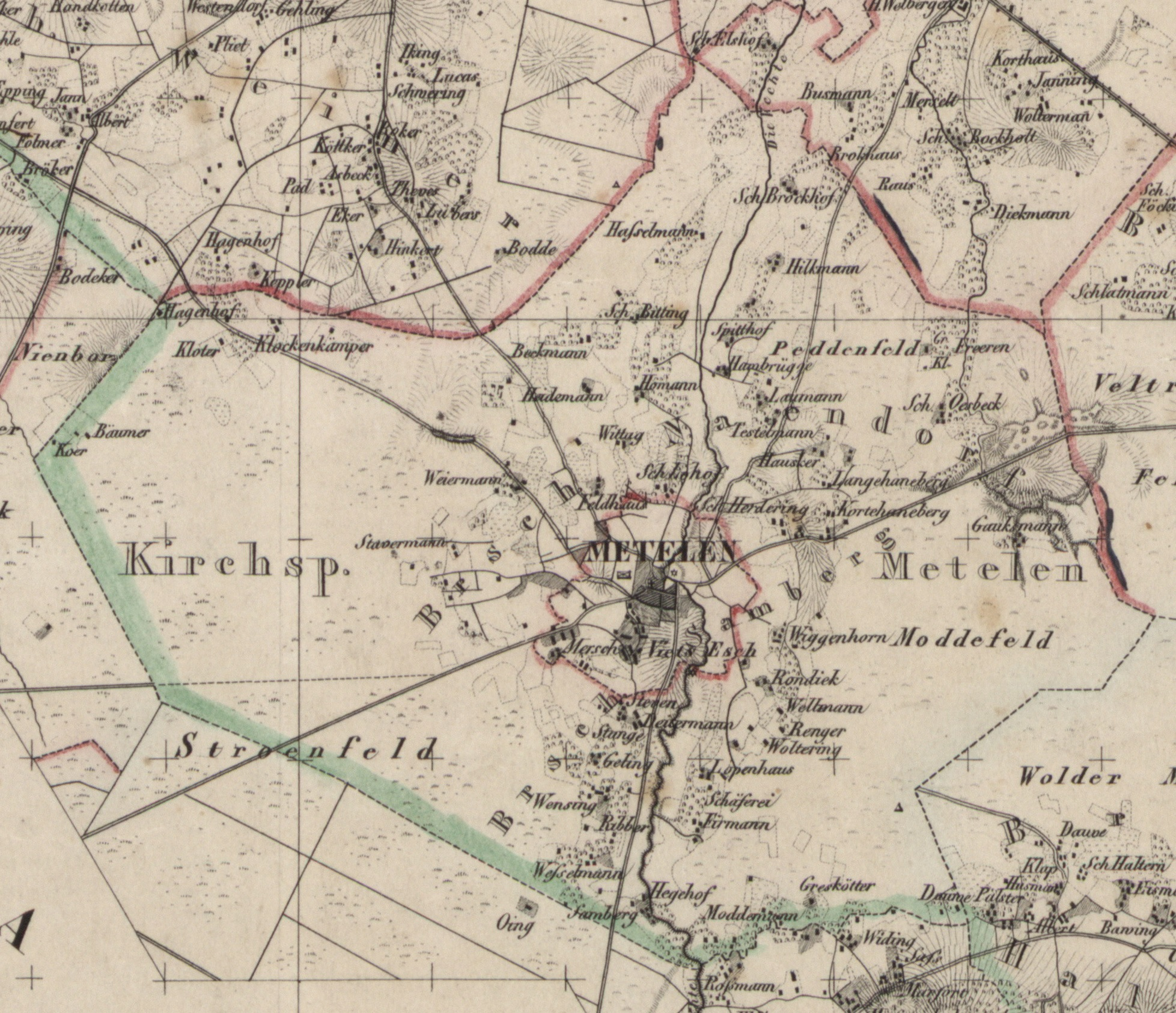 Location of Wigbold and Kirchspiel Metelen